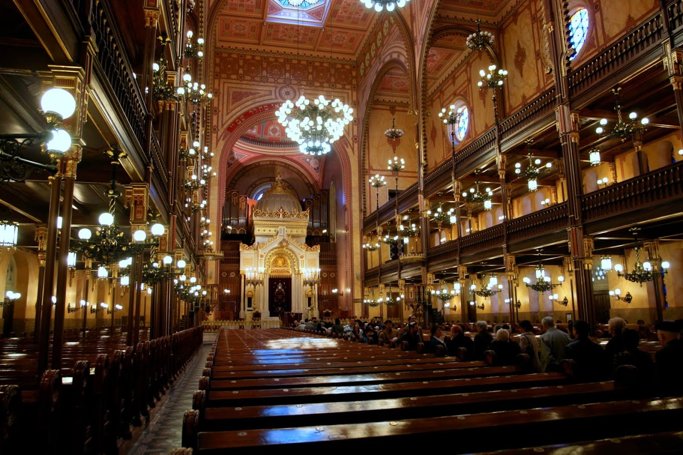 Dohány utcai zsinagóga